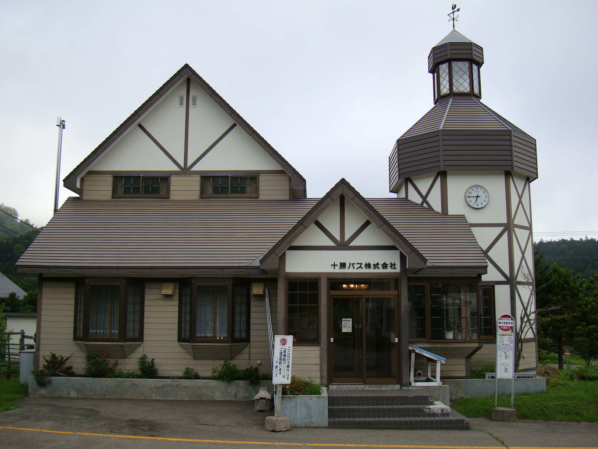 Nukabira information